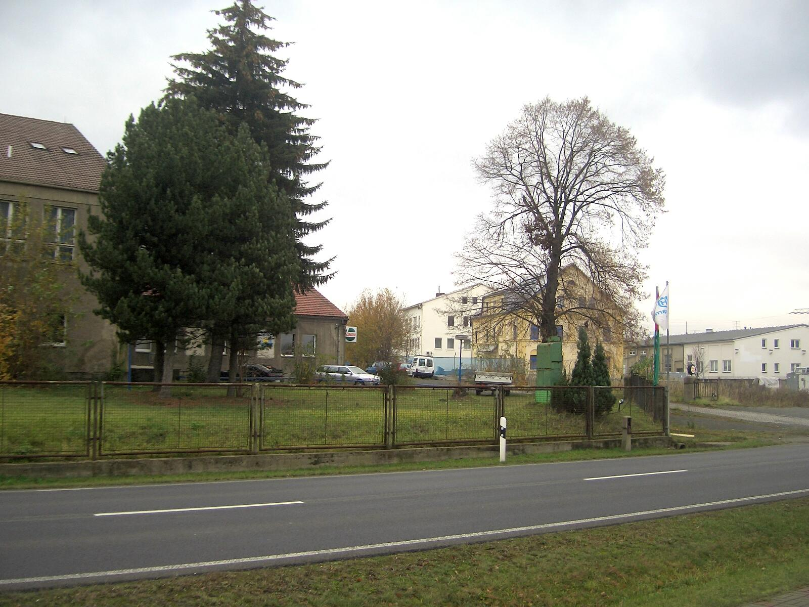 Gewerbegebiet auf dem Gelände des ehemaligen Ferrolegierungswerk Hirschfelde.